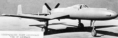 Vultee XP-54 Swoose Goose